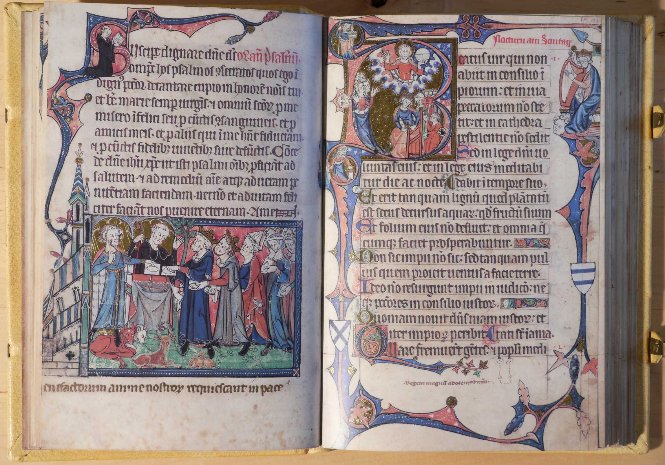 Abbildung eines Faksimiles des Ramsey-Psalters, Blatt 17b und 18a